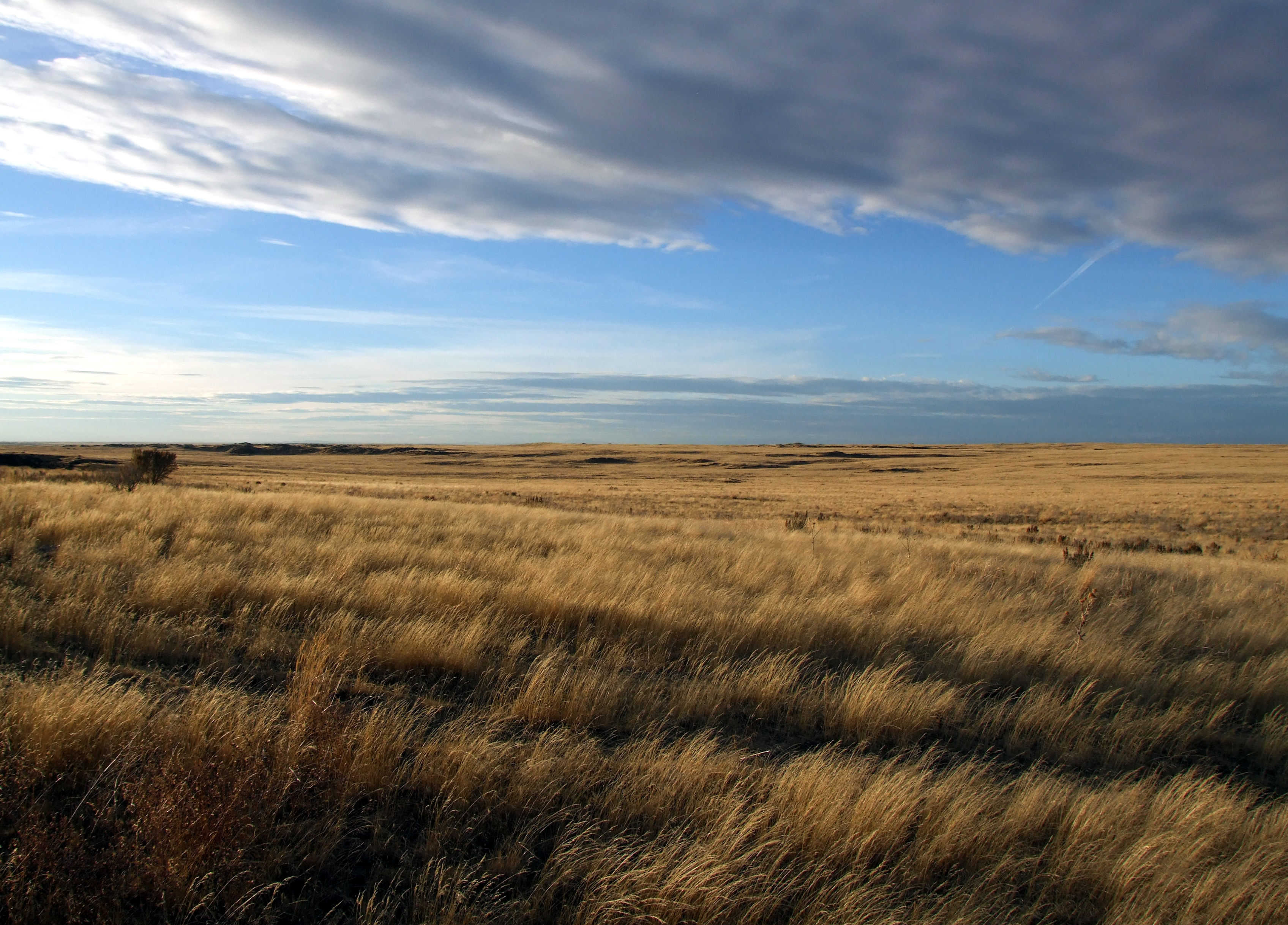 Grass